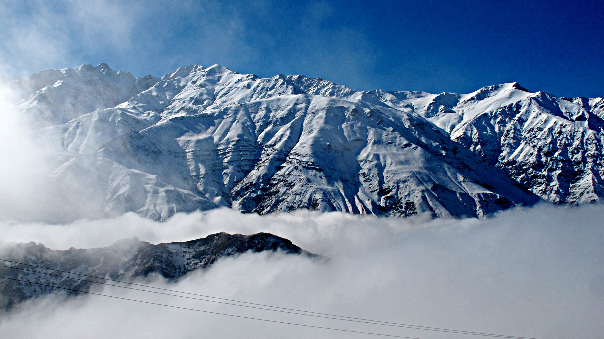 چکاد شاه البرز